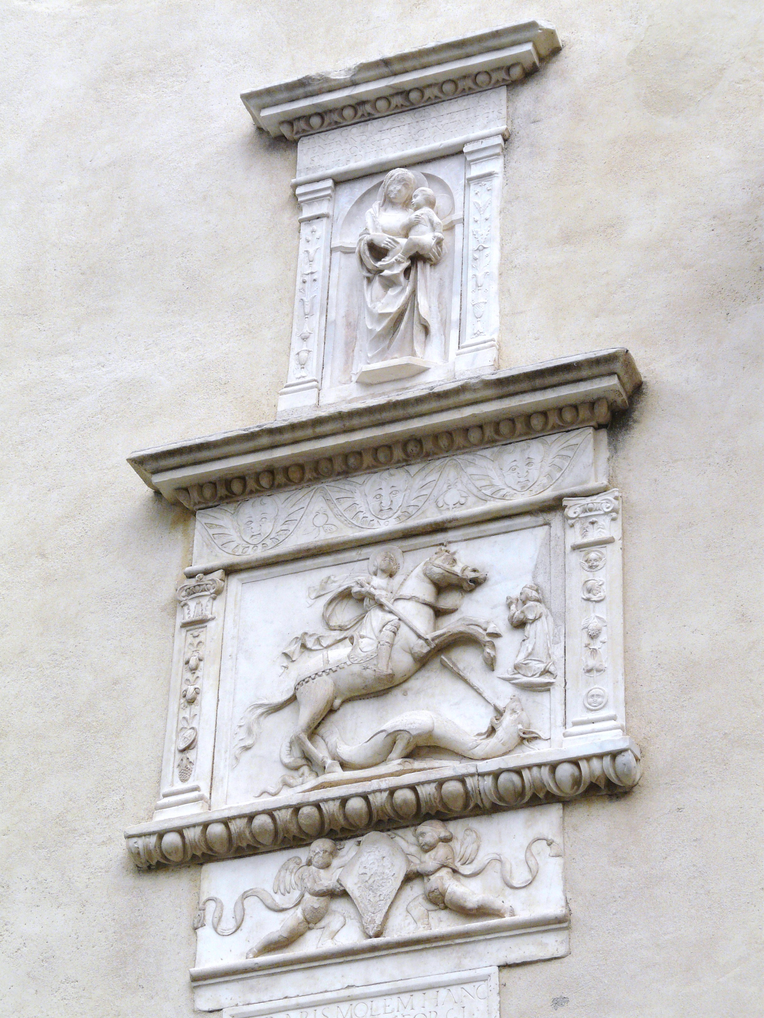 Bassorilievi del campanile dell'oratorio di San Rocco, Lerici, Liguria, Italia